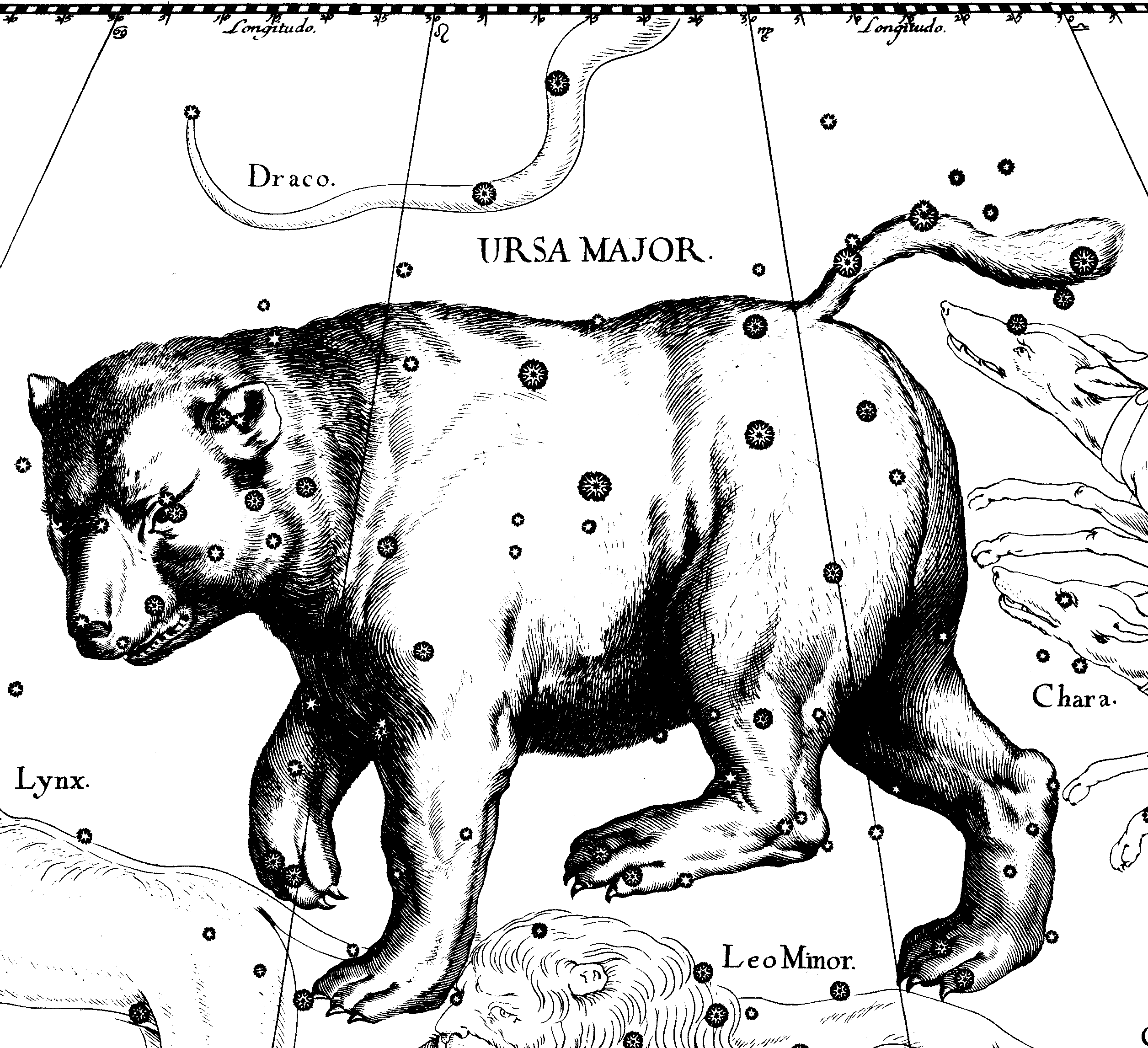 Созвездие Большой Медведицы из атласа Яна Гевелия "Firmamentum Sobiescianum"